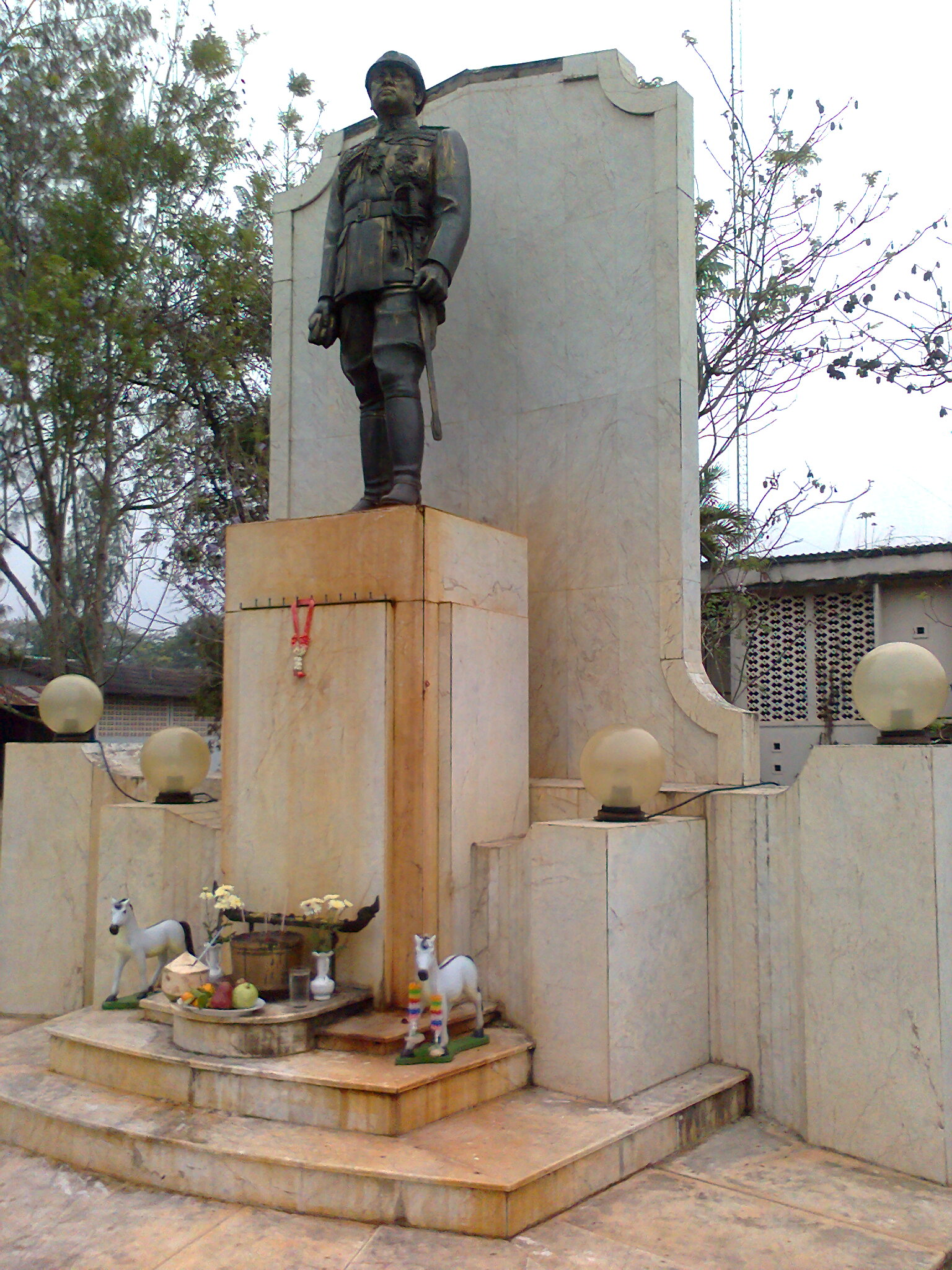 General Phahol Payuhasena Monument